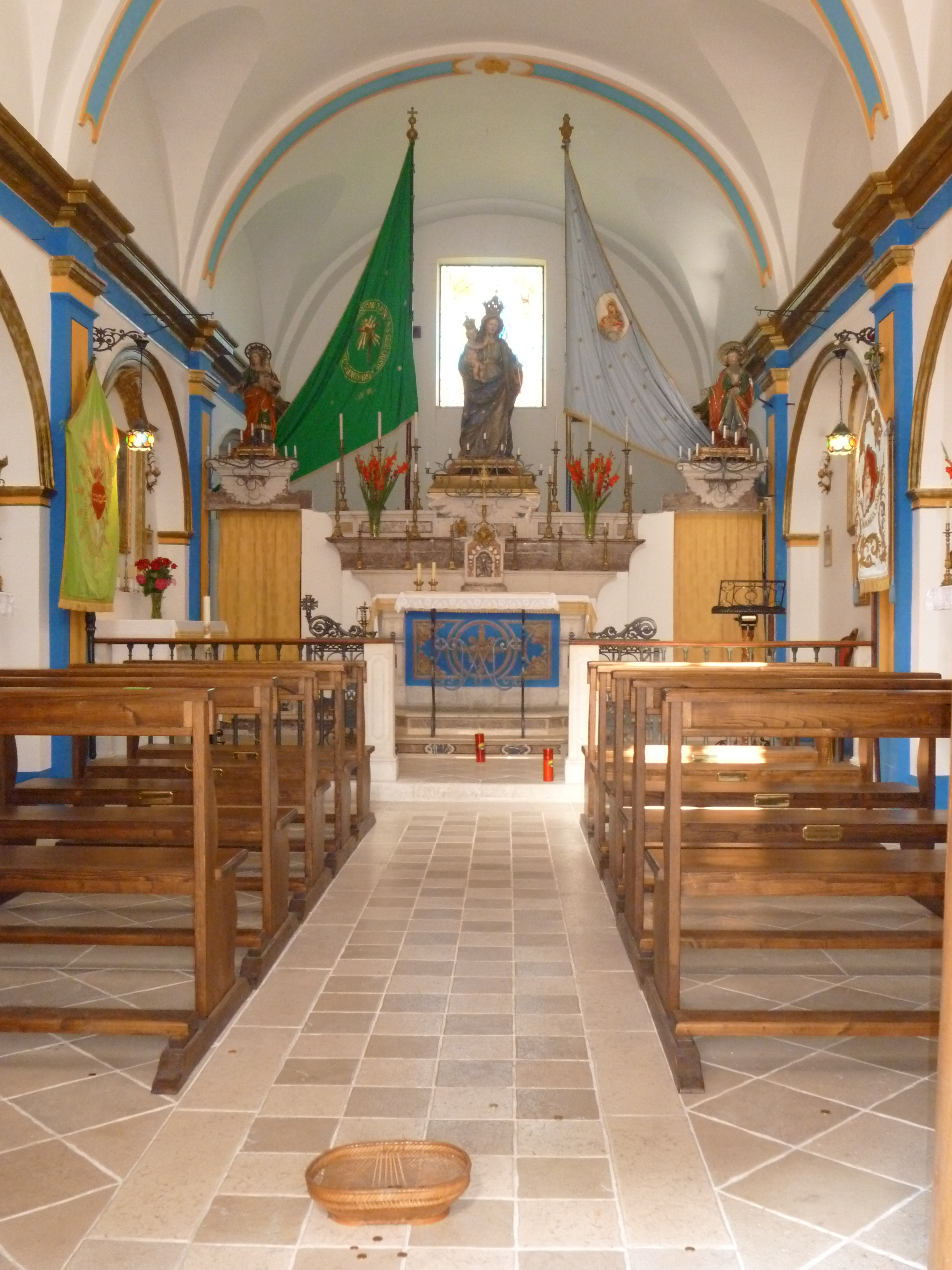 Interno della chiesa della Madonna delle Grazie. Barrea, L'Aquila.